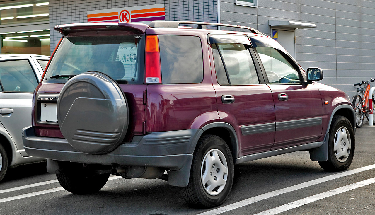 Honda CR-V ( RD1 )